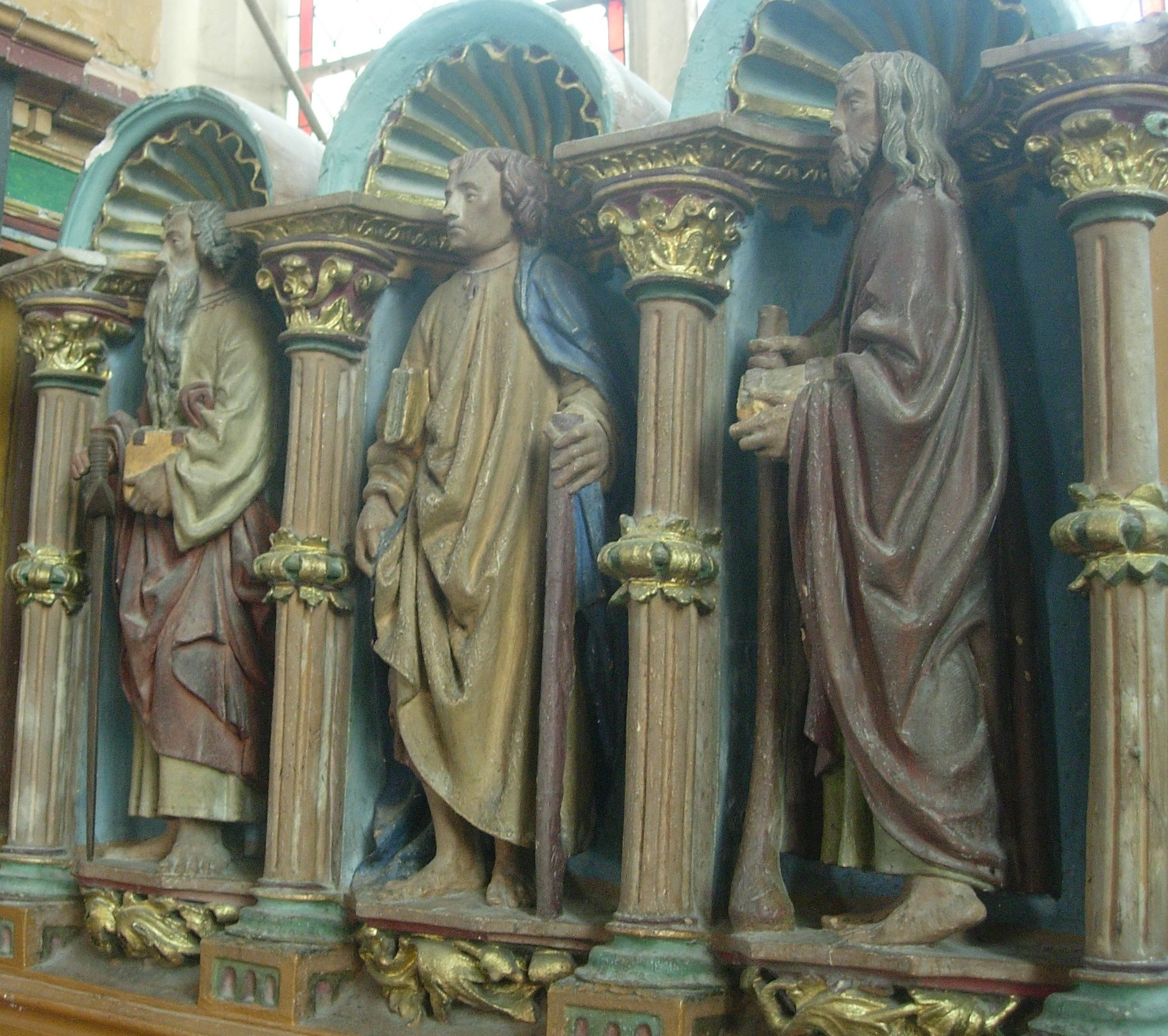 Marigny-le-Châtel : détail du retable du XVIème : une oeuvre du Maître de Chaource